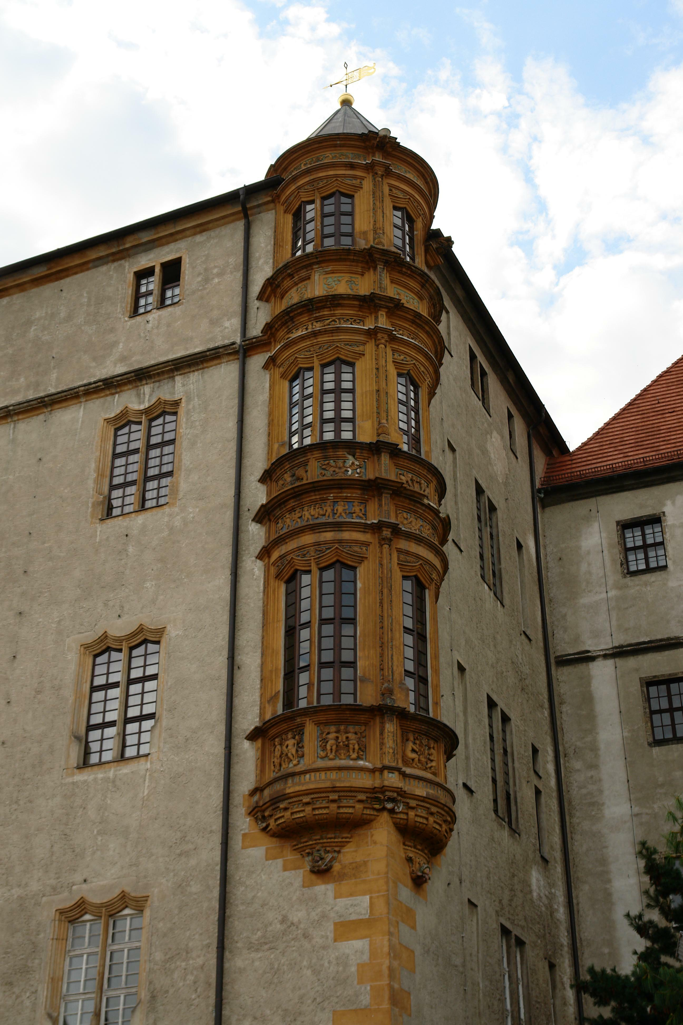 Außenerker, erbaut von Andreas Buschwitz um 1536